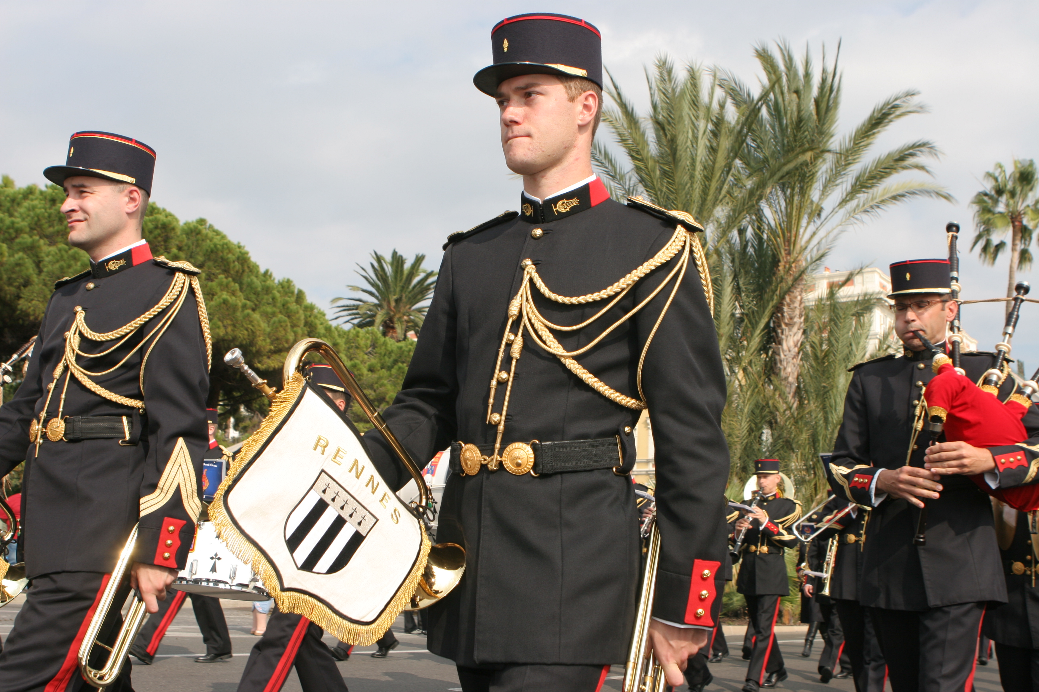 Musique de la Région terre nord-ouest de l'armée de Terre française en tenue de parade lors de festival de musiques militaires de nice le 6 octobre 2007